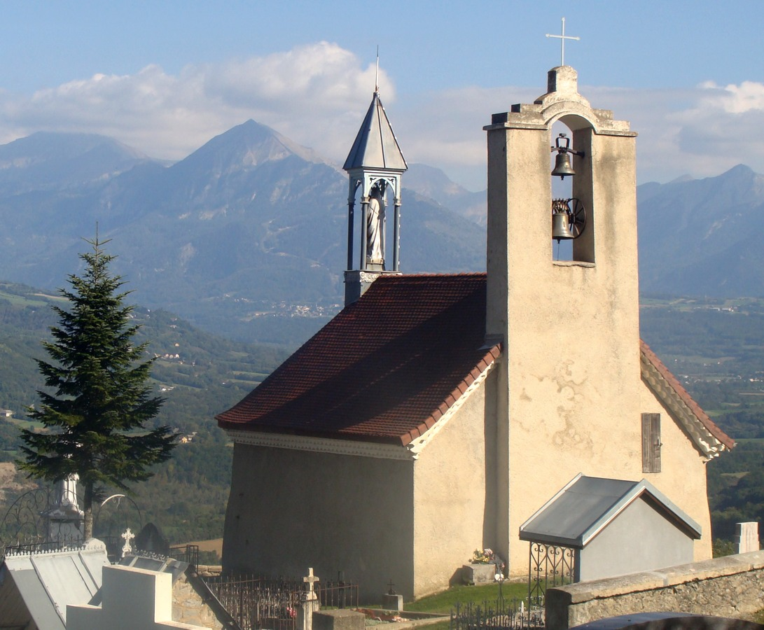 La chapelle de Notre-Dame de Bois-Vert, à la Fare-en-Champsaur (Hautes-Alpes). Comme la plupart des chapelles du Champsaur, elle possède un clocheton à l"aplomb de la façade ouest, mais sa porte d'entrée est sur le flanc sud.